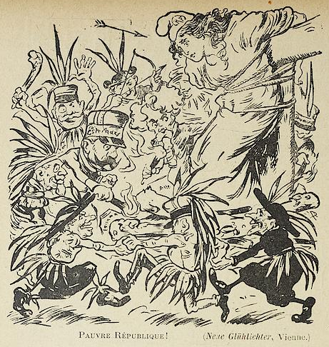 "Pauvre République" : Marianne ligotée à un poteau autour duquel dansent, costumés en sauvage, les personnages représentant le sabre et le goupillon. Au centre, sous l'oeil d'Henri Rochefort, le commandant Esterhazy allume le bûcher. Caricature autrichienne parue dans le Neue Glühlichter, 1898 (reproduit dans Le Rire du 26 février 1898).